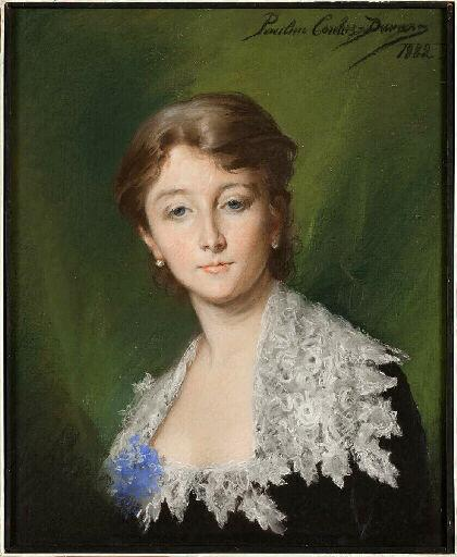 Madame Baugnies, née Marguerite Jourdain, pianiste et cantatrice lyrique amateure, hôtesse d'un salon musical parisien, future Madame de Saint-Marceaux (1892). Portrait signé et daté en haut à droite : Pauline Carolus-Duran 1882.